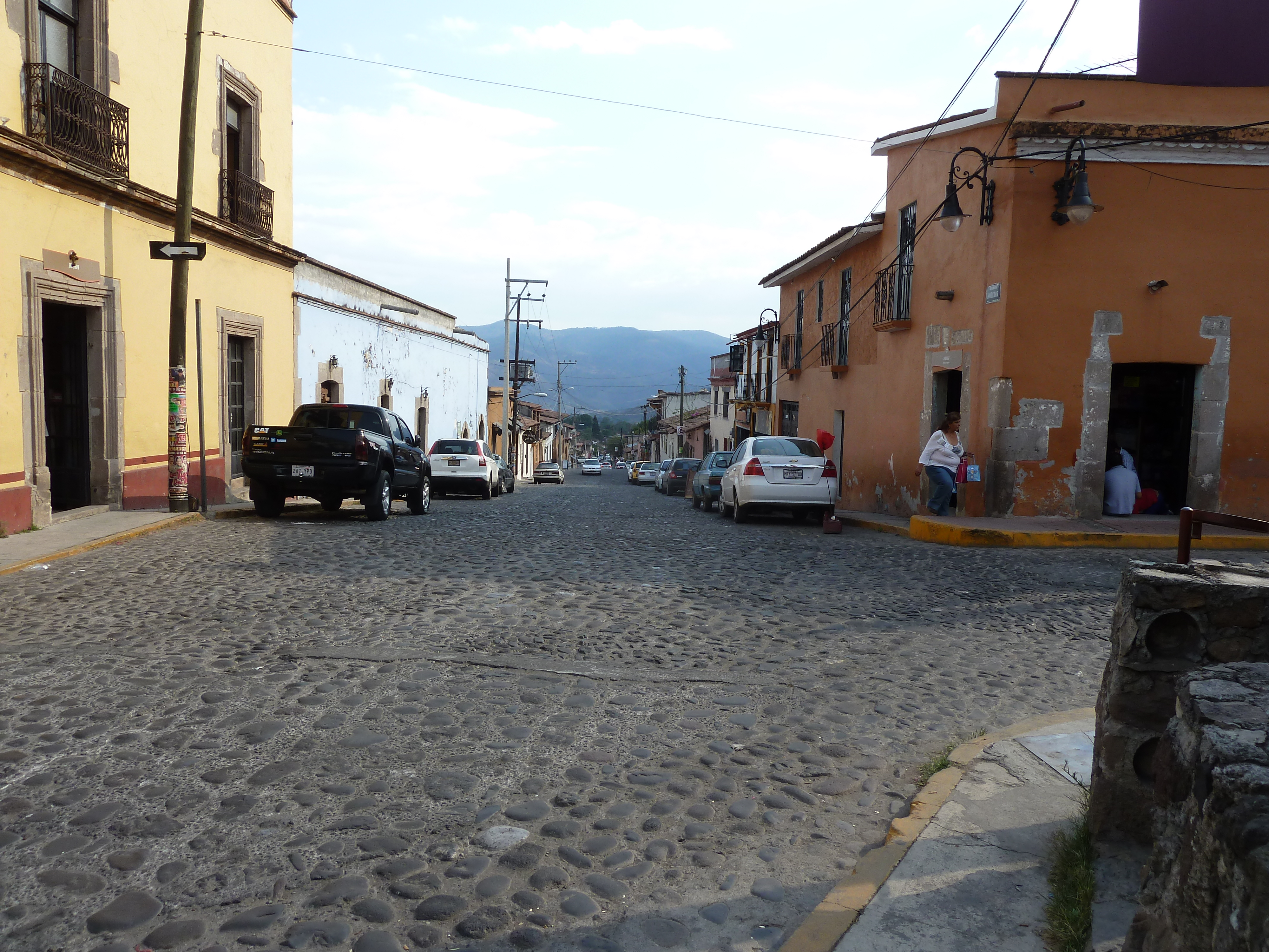 Malinalco, centro urbano, carretera de Morelos